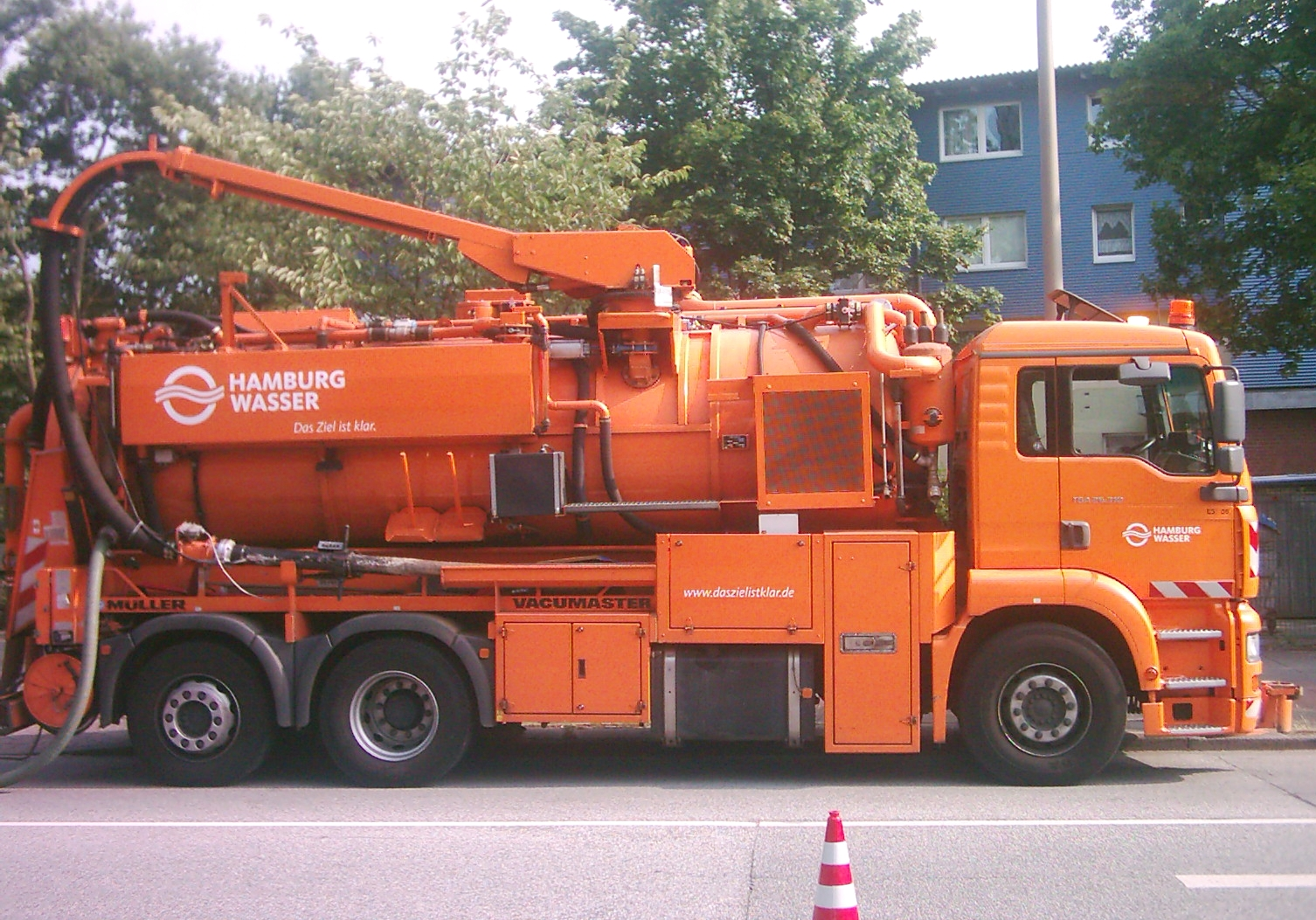 Vacumaster der Hamburger Stadtentwässerung/Hamburg Wasser.